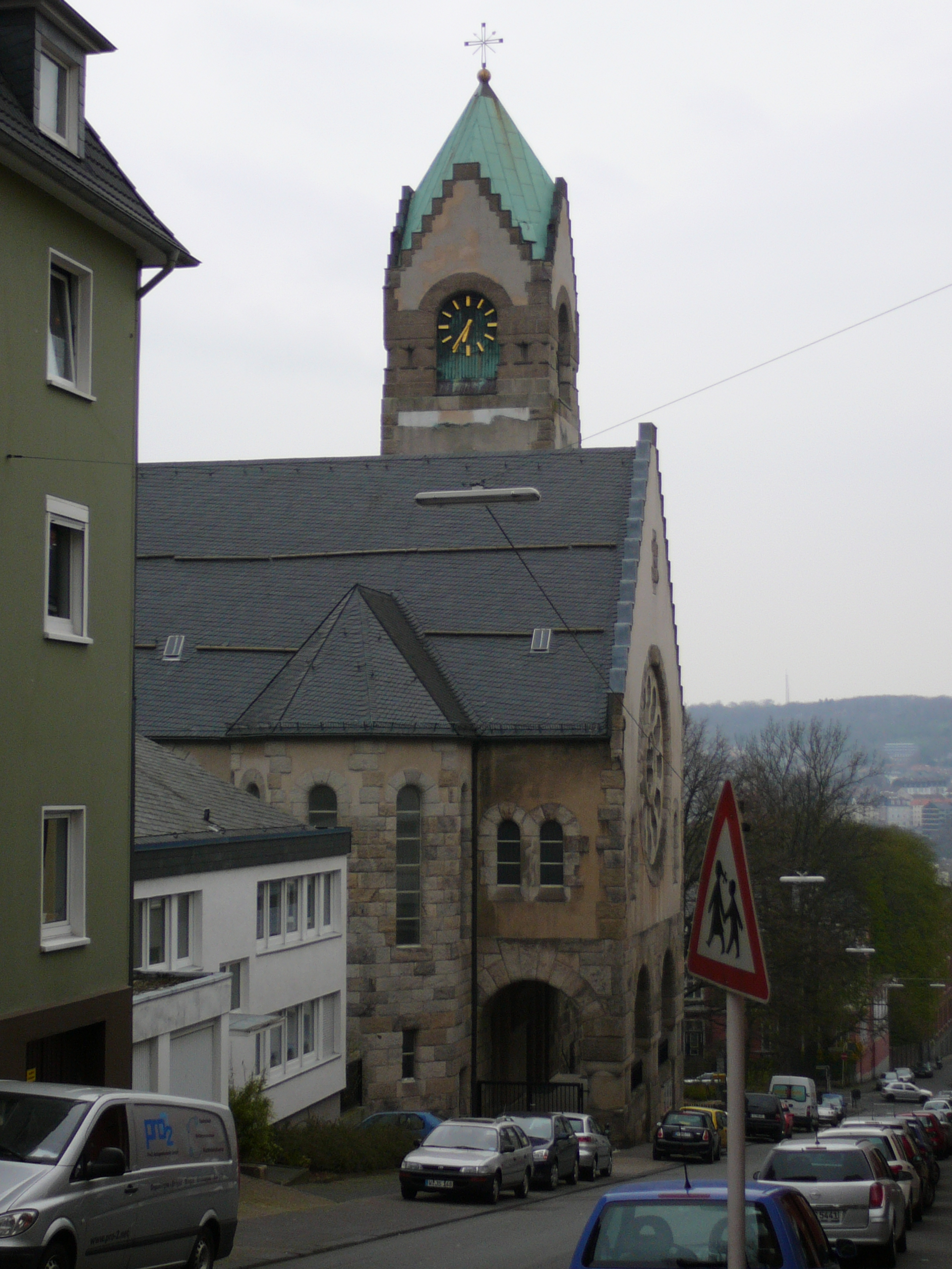 Obere Sehlhofstraße, Wuppertal